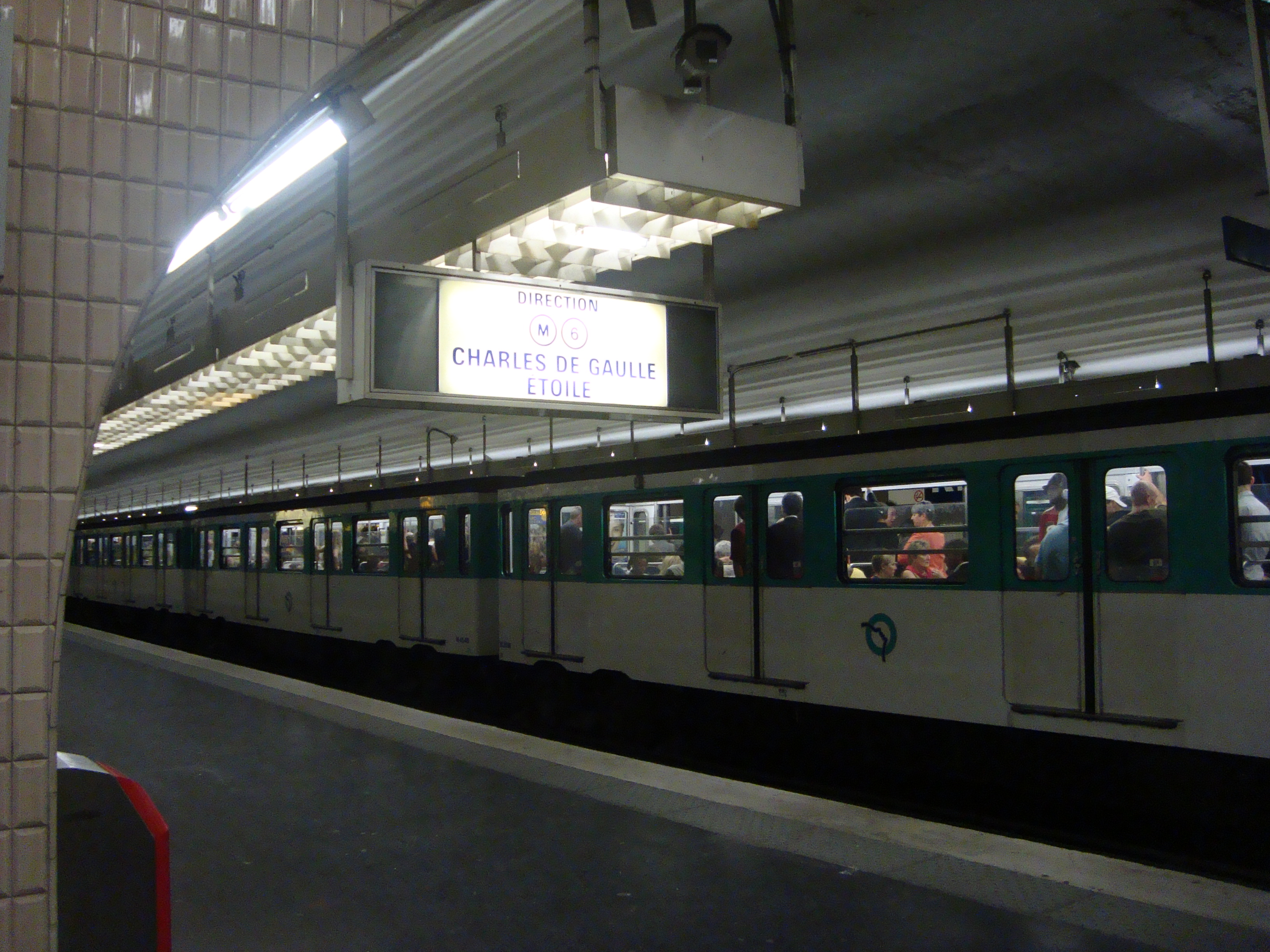 Une rame direction Nation à l'arrêt à la station Kléber sur la ligne 6 du métro de Paris.